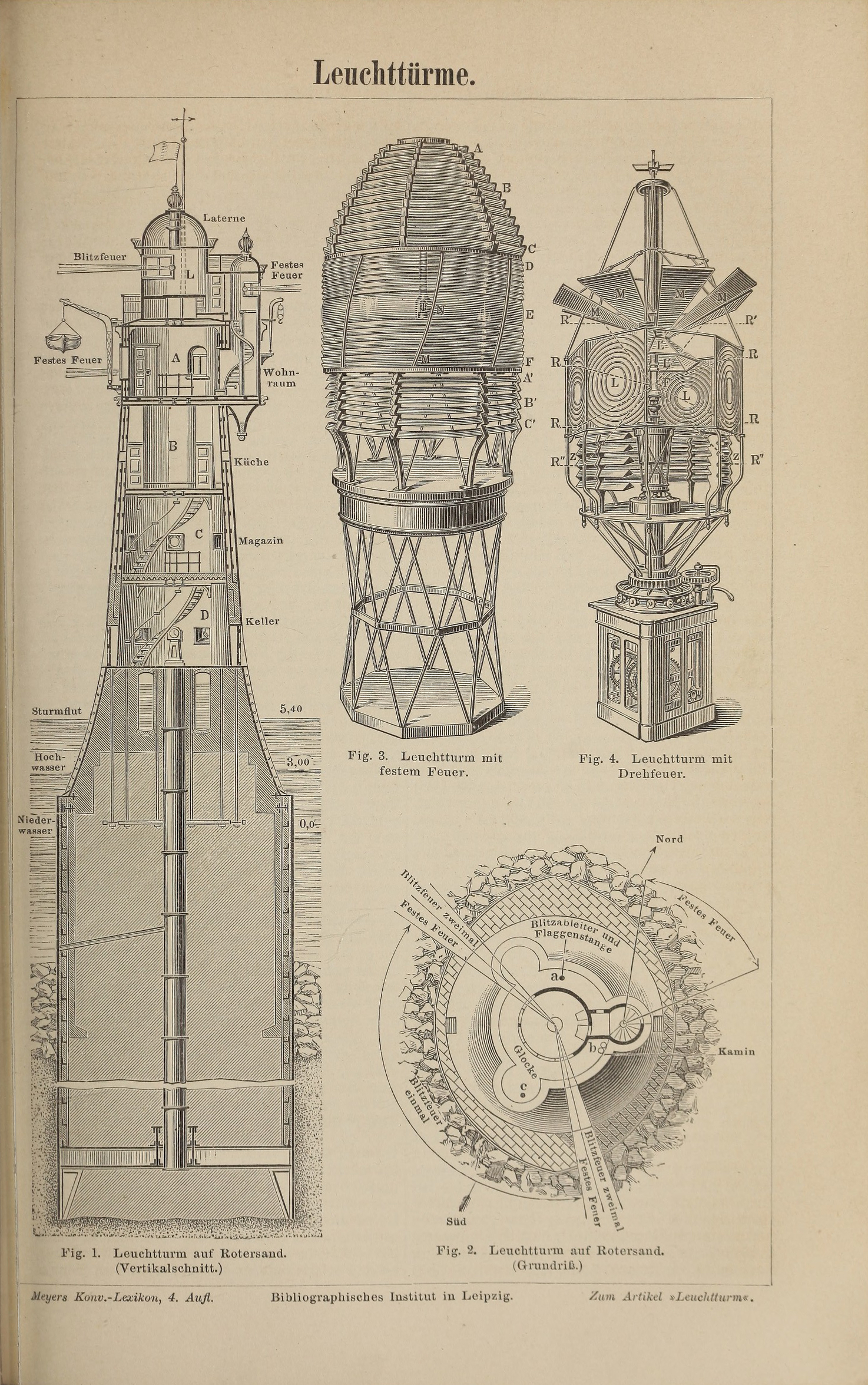 Original-Bildunterschrift: Leuchttürme. Fig. 1. Leuchtturm auf Rotersand (Vertikalschnitt). Fig. 2. Leuchtturm auf Rotersand (Grundriß). Fig. 3. Leuchtturm mit festem Feuer. Fig. 4. Leuchtturm mit Drehfeuer.